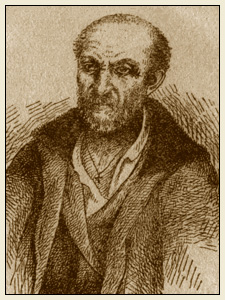 Ivan Koreisha